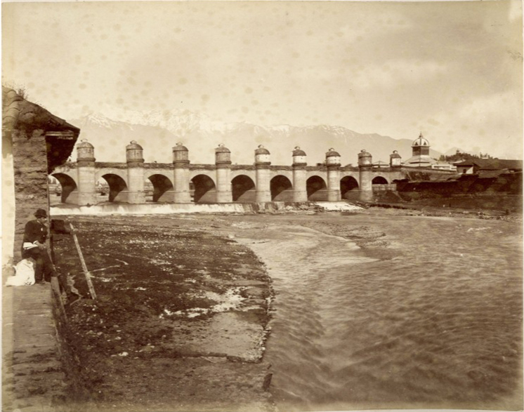 El puente de Calicanto sobre el río Mapocho en Santiago de Chile (1860)